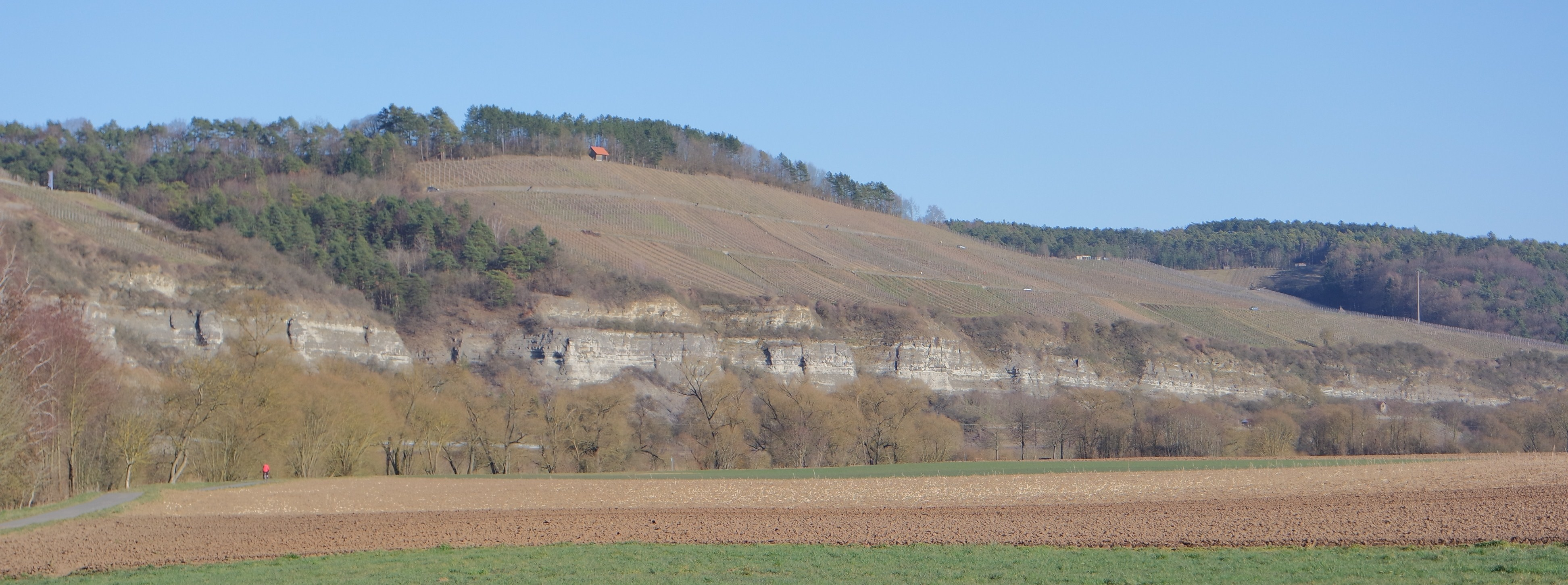 Geotop Prallhang südlich Karlstadt (Stettener Weinberge) vom Laudenbacher Mainufer